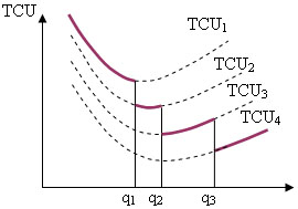 Середні річні витрати управління запасами при оптовій знижці